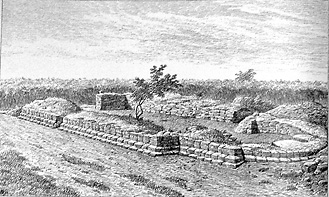 Ruiner af Knud Lavards Kapel ved Haraldsted, fundne i Aaret 1883 af Dr. Henry Petersen og udgravede det følgende Aar. Det er utvivlsomt, at Kapellet, der er blevet nedbrudt for aarhundreder siden, er blevet bygget netop paa det sted, hvor Knud Lavard dræbtes den 7de Januar 1131.